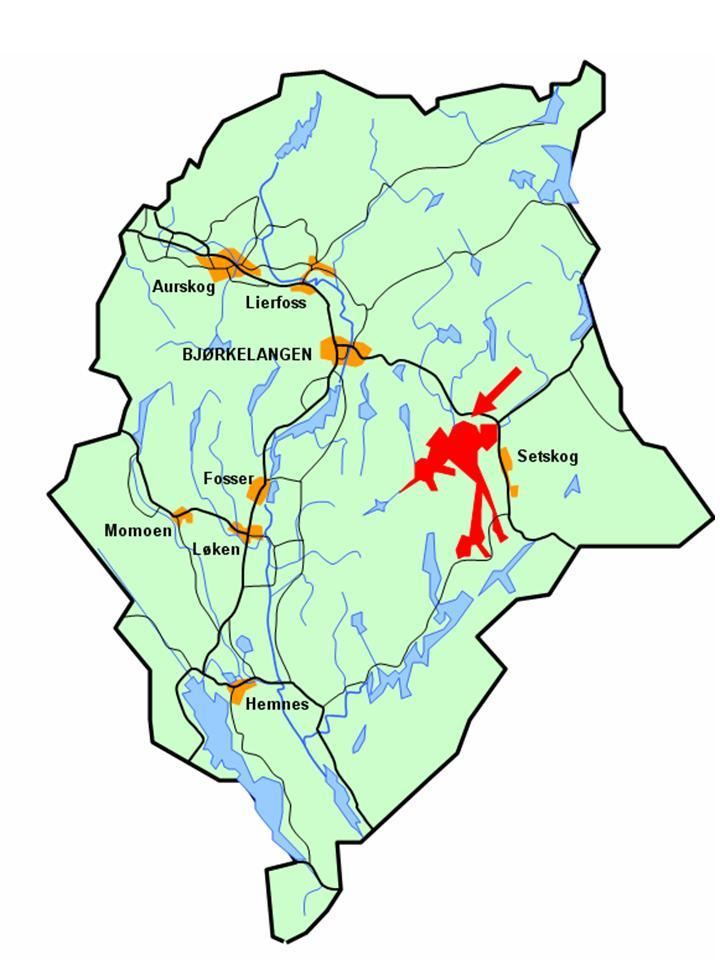 Stilisert kart som viser innsjøen Setten sin lokalisering i Aurskog-Høland kommune.